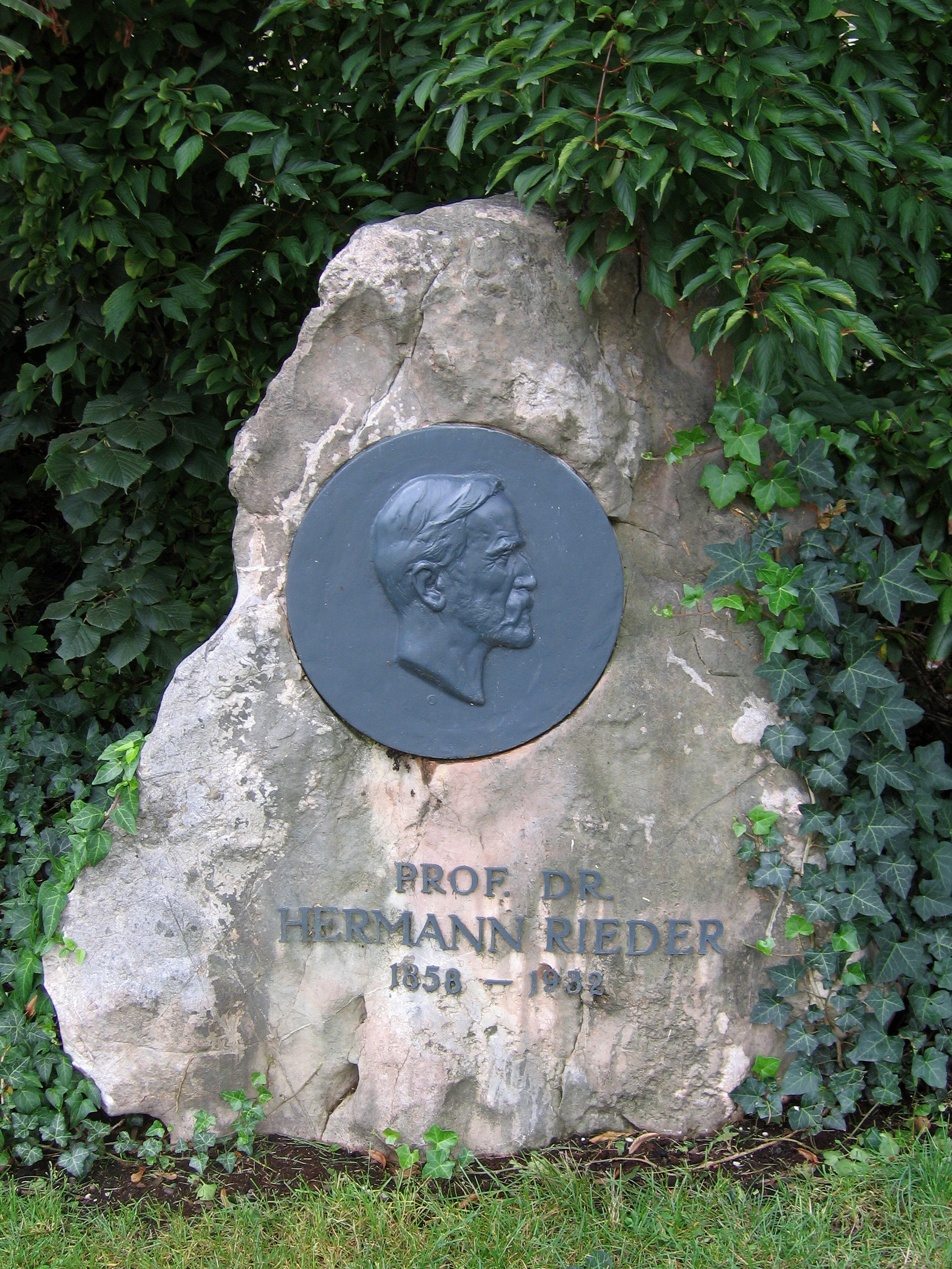 Gedenkstein für Prof. Hermann Rieder im Riedergarten, Rosenheim